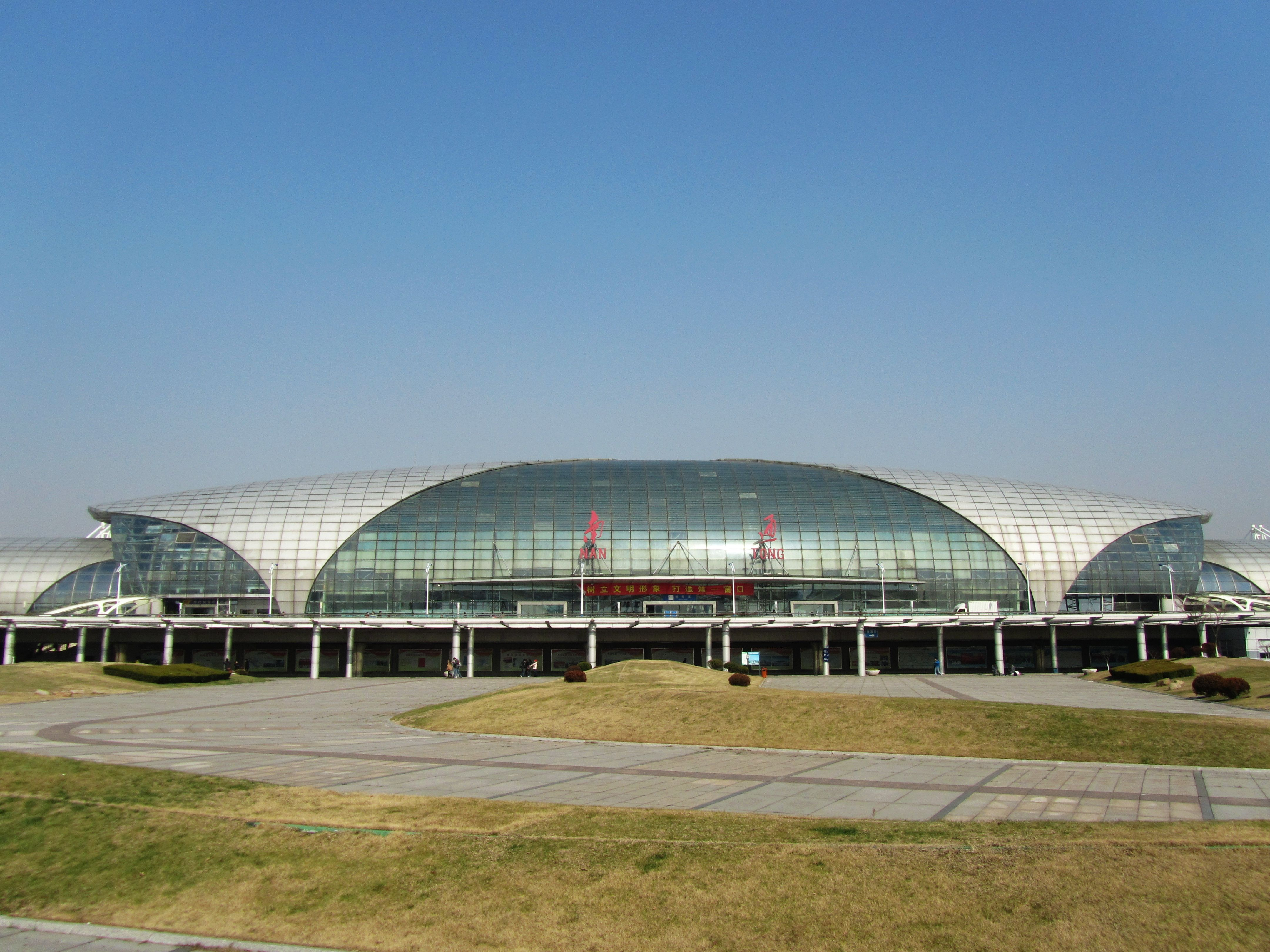 南通火车站站房。